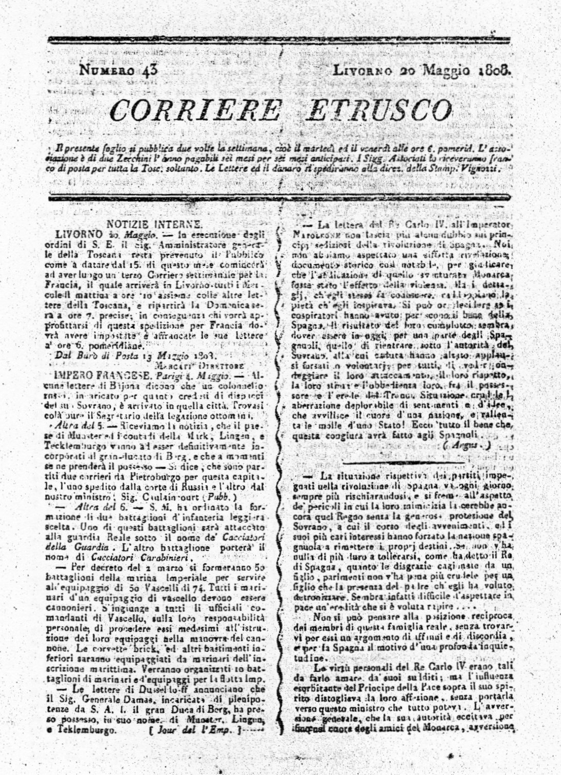 Scansione della pagina del libro di Ersilio Michel che ha anche lui fotocopiato dall'archivio della biblioteca di Livorno. Immagine relativa al numero 43 del 20 maggio 1808 del bisettimanale Corriere Etrusco.